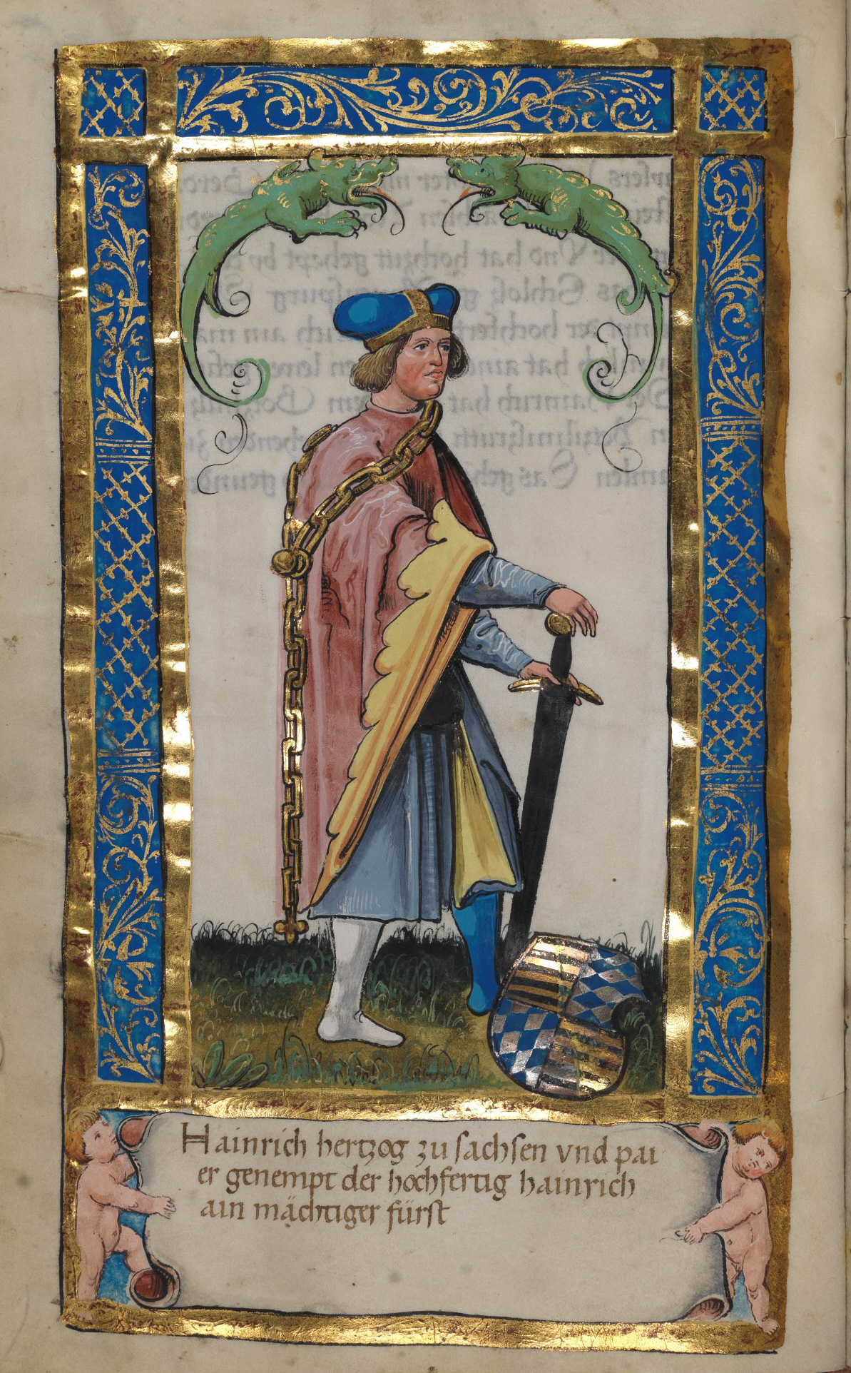 Weingartener Stifterbüchlein, Württembergische Landesbibliothek Stuttgart, Cod.hist.qt.584, fol. 33v, Stifterbild Herzog Heinrich der Stolze Hainrich hertzog zu sachsen vnd paier genempt der hochfertig hainrich ain mächtiger fürst